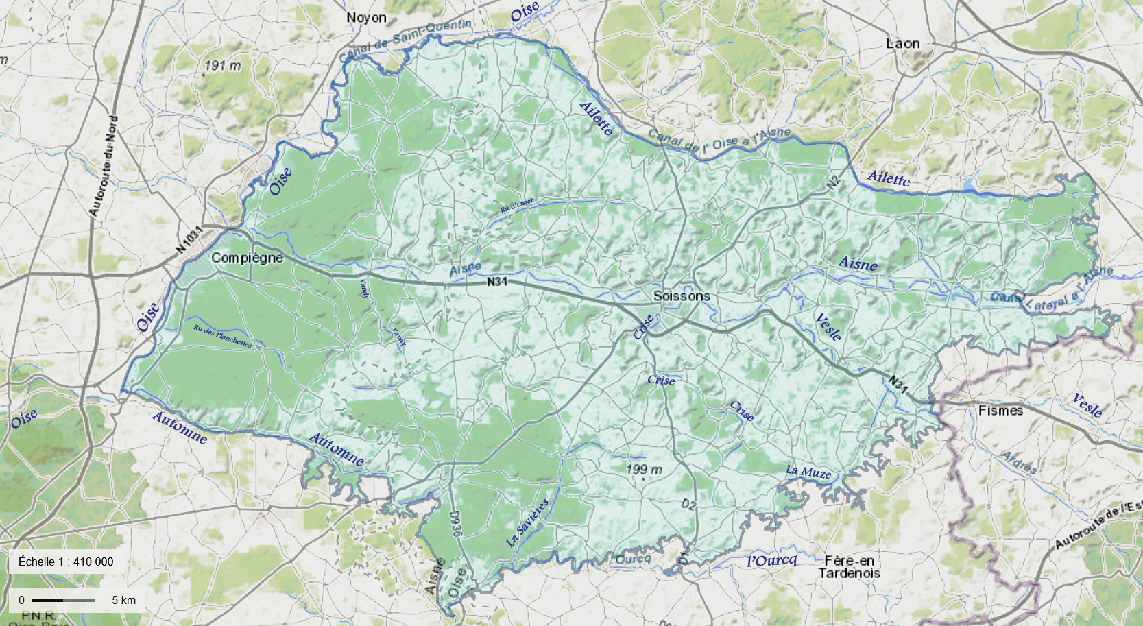 Principales rivières du Soissonnais